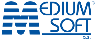 Logo společnosti MEDIUM SOFT a.s.